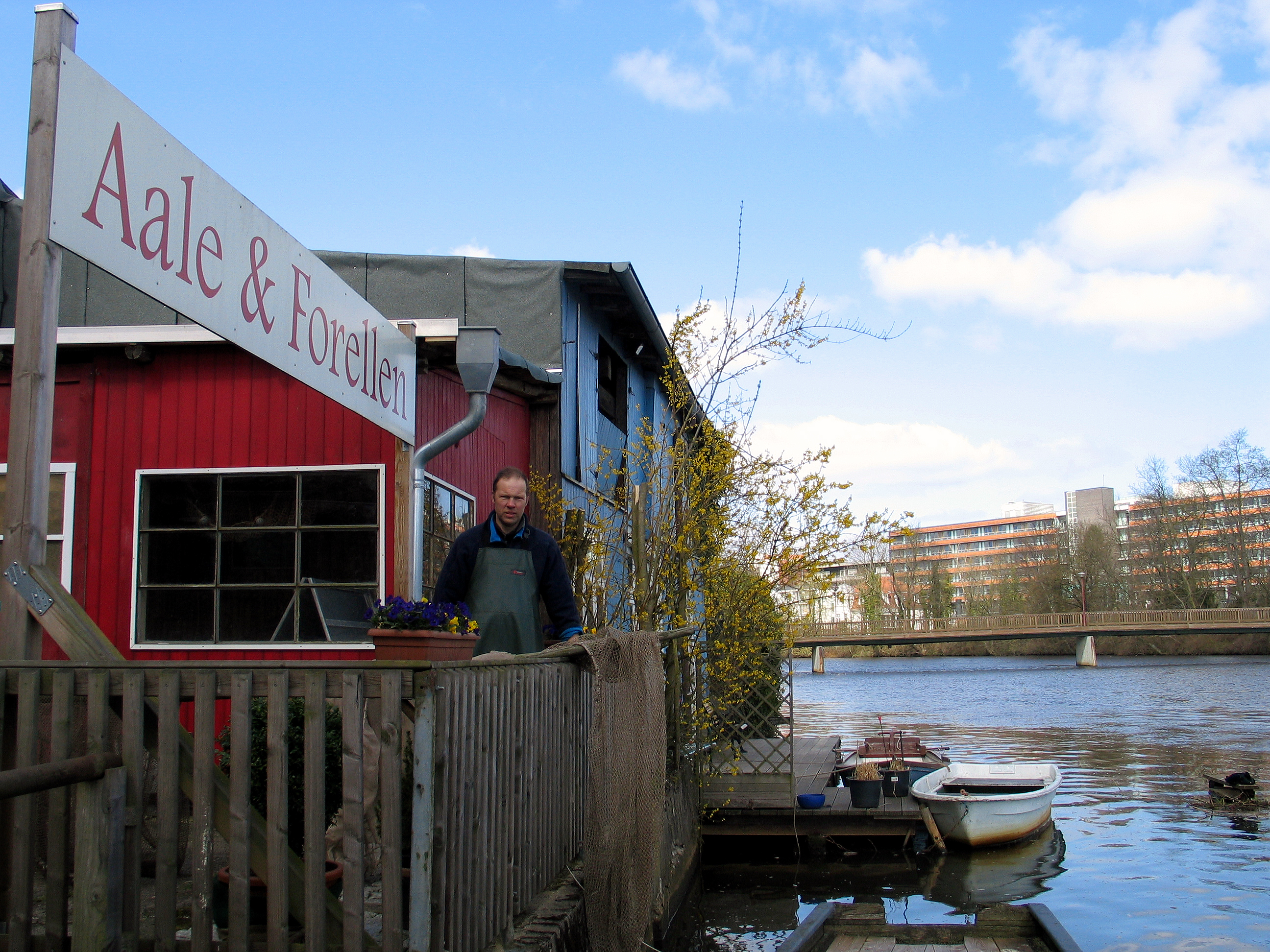 Auf der der Aller zugewandten Seite des Fachwerkgebäudes Fritzenwiese 51 signalisierte das Schild "Aale, Forellen" den Fischverkauf den Spaziergängern auf der anderen Flußseite, an der Dammaschwiese. Auch von der im Hintergrund zu sehenden Pfennigbrücke ist das Schild und die Boote des in 7. Generation tätigen Fischermeisters Hans-Friedrich Nölke gut zu erkennen ...